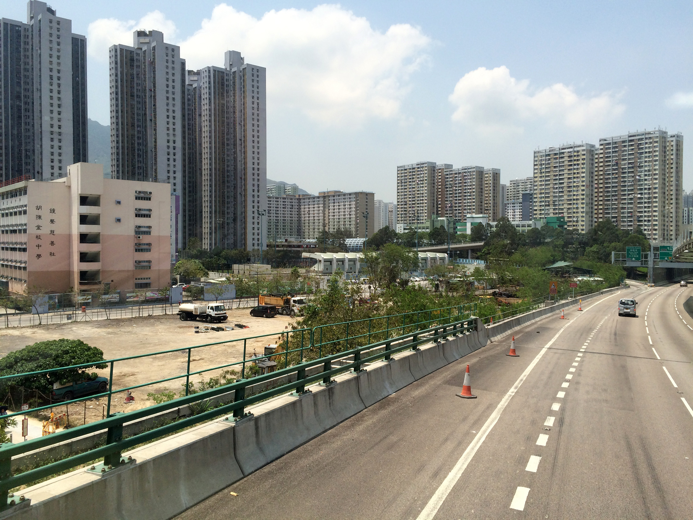 Tuen Mun Siu Lun Government Complex site